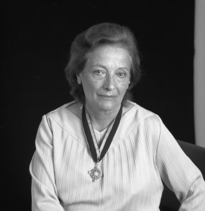 Frau Maria Wimmer, Mitglied des Ordens Pour le merité für Wissenschaften und Künste.